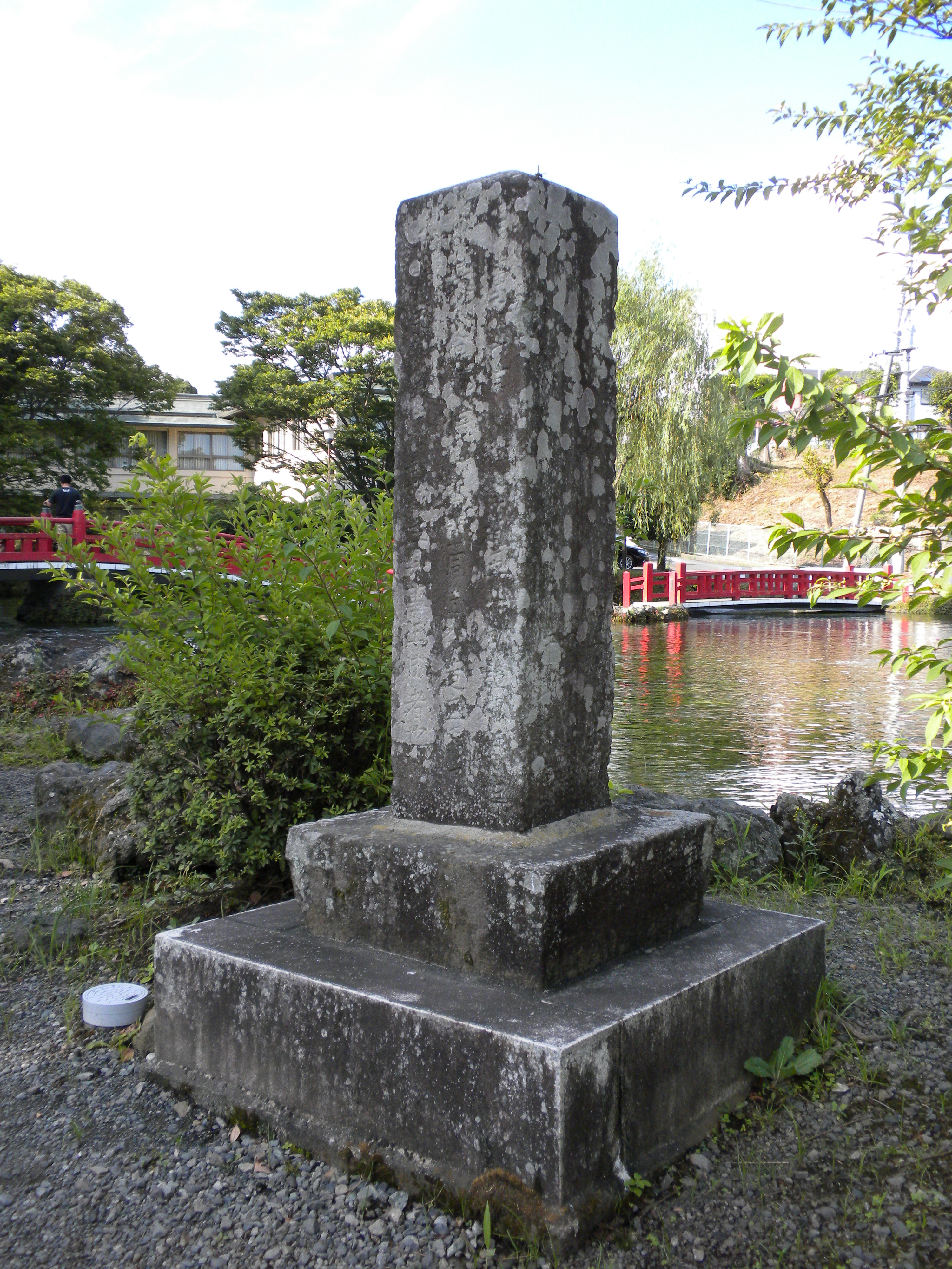 山宮御神幸道の石碑（富士山本宮浅間大社境内）